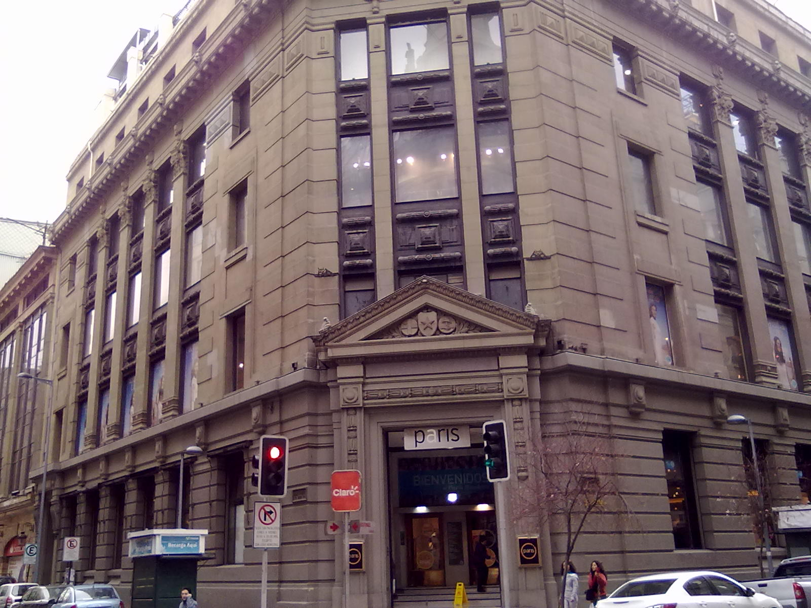 PARIS BANDERA